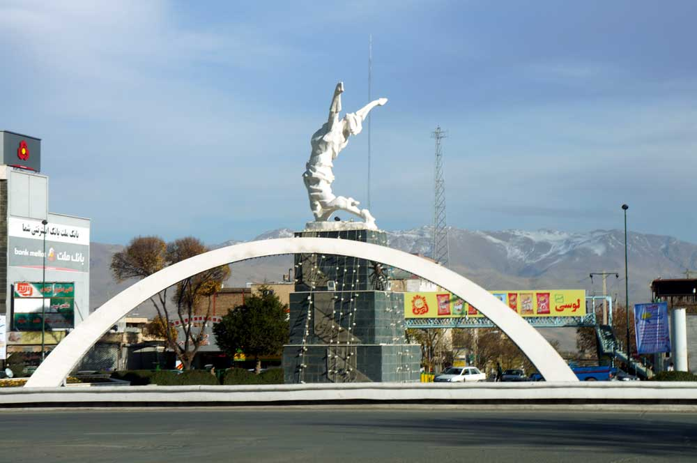 Sanandaj, Iran 2013 (30)